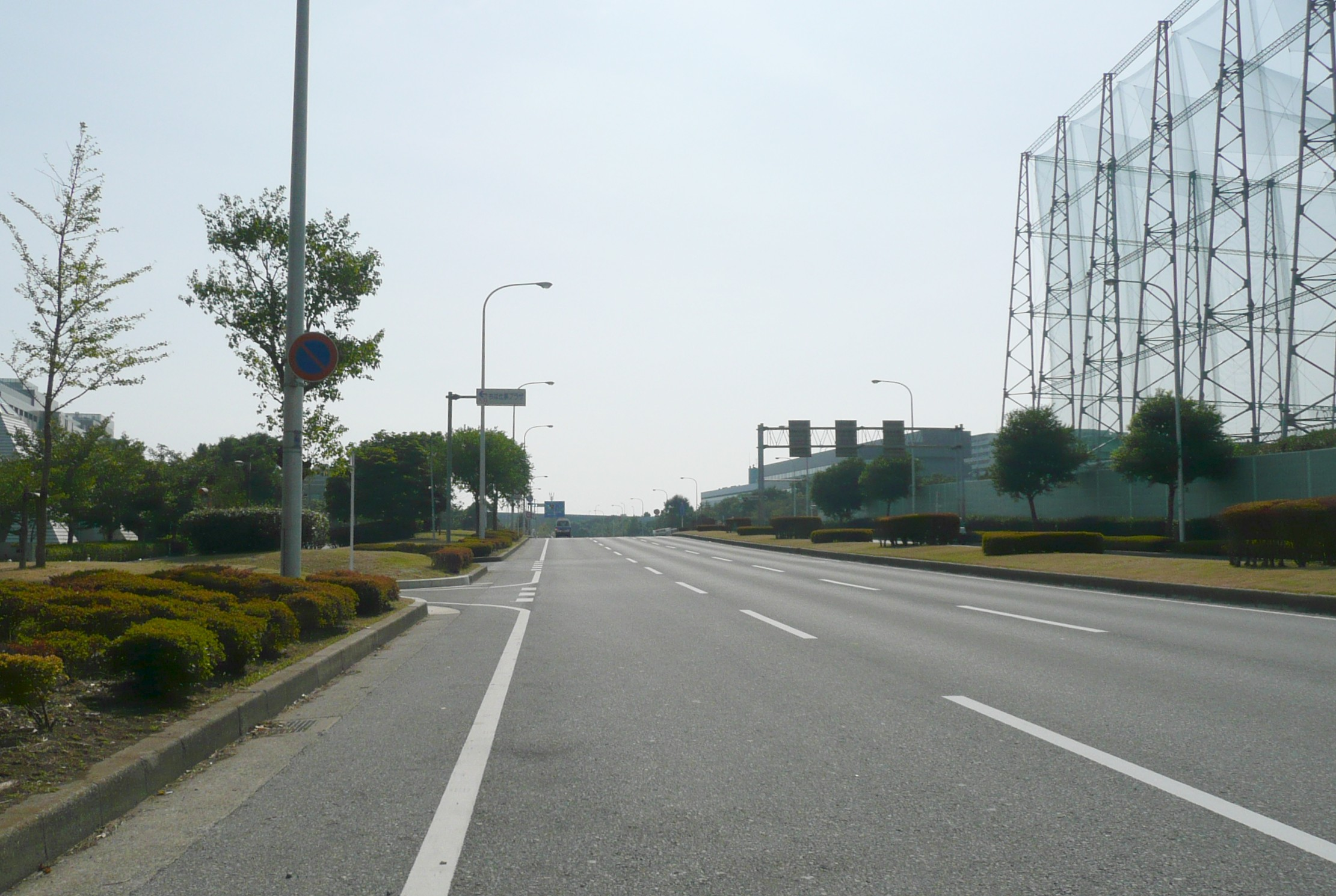 千葉県道15号千葉船橋海浜線（千葉市美浜区内にて）